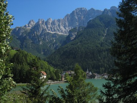 Lago di Alleghe und die Nordwestwand der Civetta. V.l.n.r.: Torre di Coldai (2600 m), Torre di Alleghe (2649 m), Torre di Valgrande (2715 m), Pan di Zucchero (2726 m), Monte Civetta (3220 m), Piccola Civetta (Kleine Civetta) (3207 m) und im Vordergrund Col Roan (2281 m), rechts dahinter die Cima de Gasperi (2994 m). Die Version auf commons hält genaue Bildannotationen bereit.